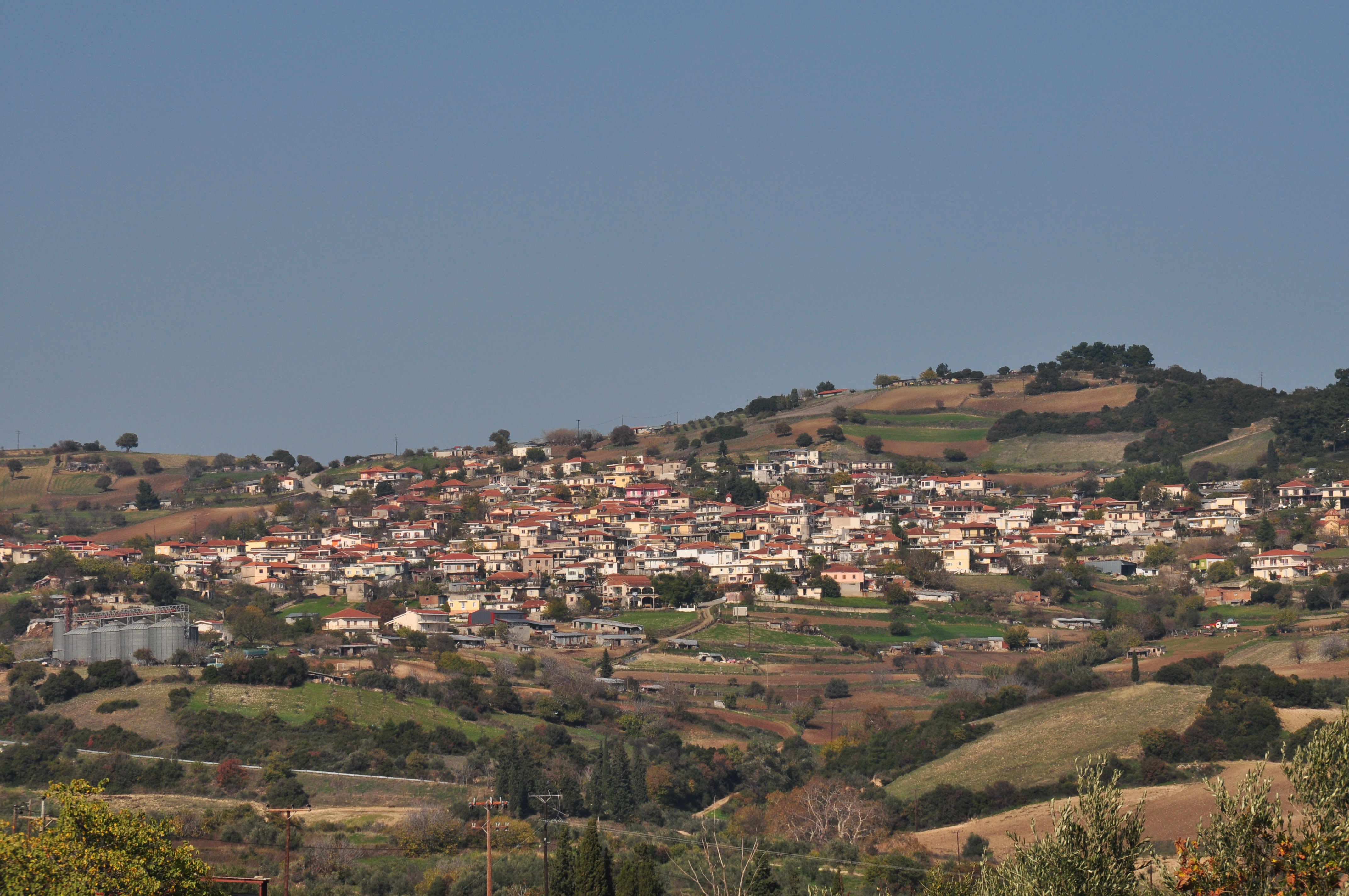 Άποψη του χωριού "Ζέλι".